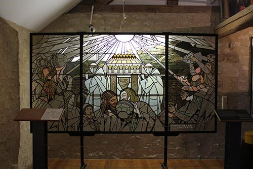 Réalisé en 1926 dans l’atelier nancéien Höner Janin-Benoit de la main du maître-verrier Georges Janin (1884-1955), ce vitrail décorait initialement le Palais de la Bière de Nancy, un dancing datant du début du XXe siècle. Dans une esthétique Art Déco, ce vitrail relate le miracle de saint Arnould (582-641), un évêque de Metz devenu saint patron des brasseurs après avoir sauvé de la soif le cortège qui rapatriait ses cendres, en lui donnant de la bière à foison.